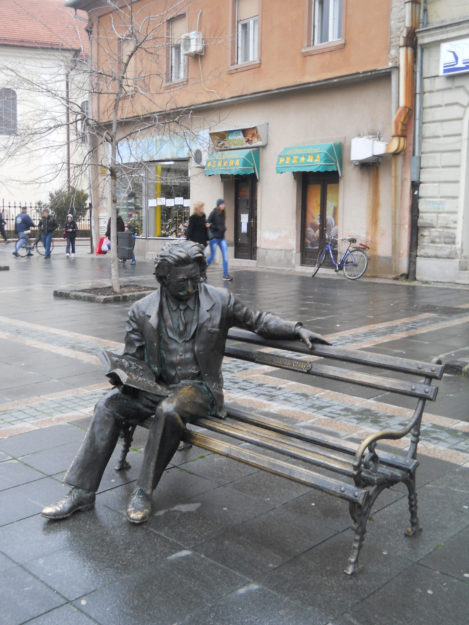 Zombor - Laza Kostić szobra